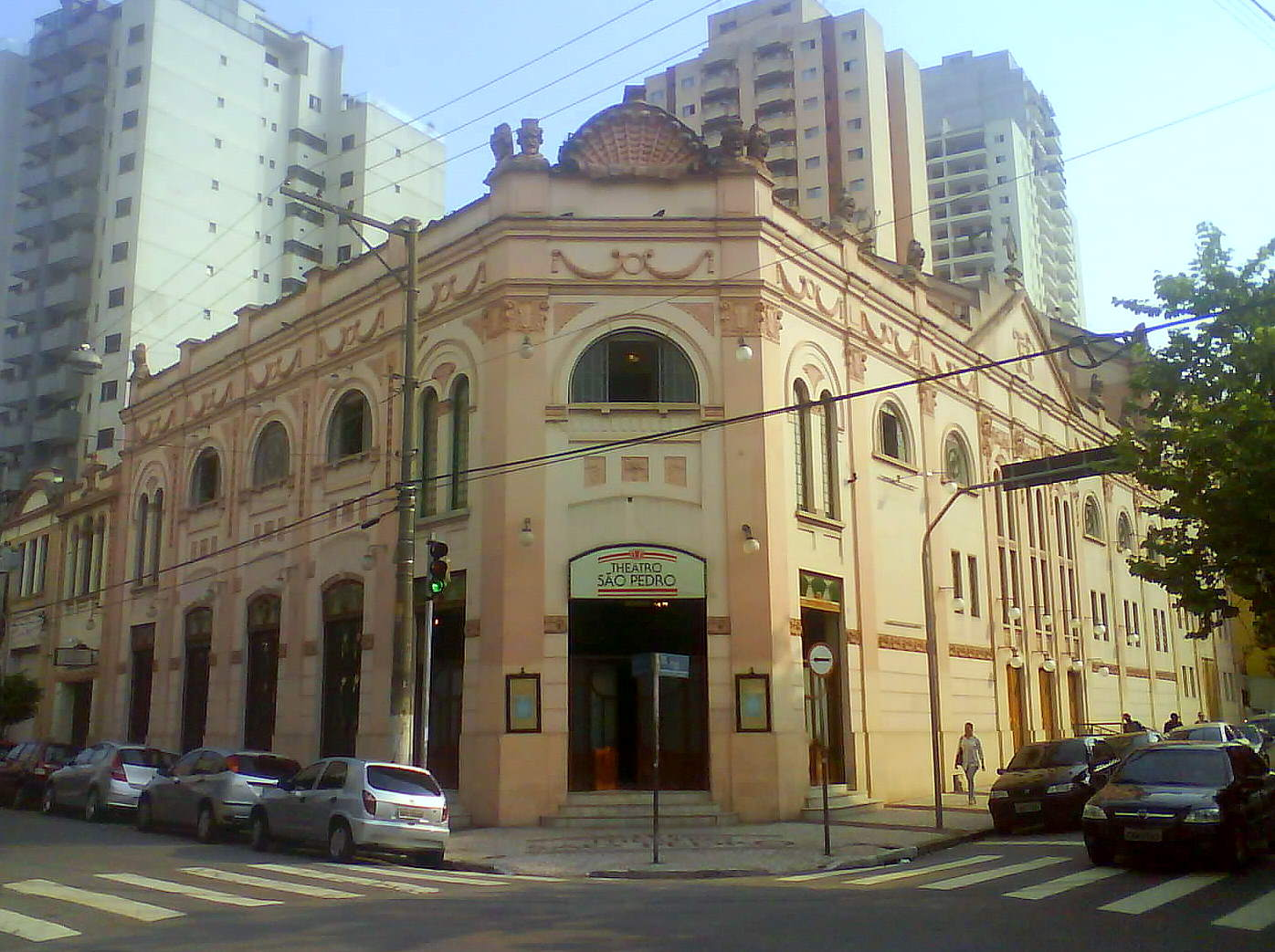 Teatro São Pedro (Theatro São Pedro), no distrito de Santa Cecília, São Paulo, Brasil.